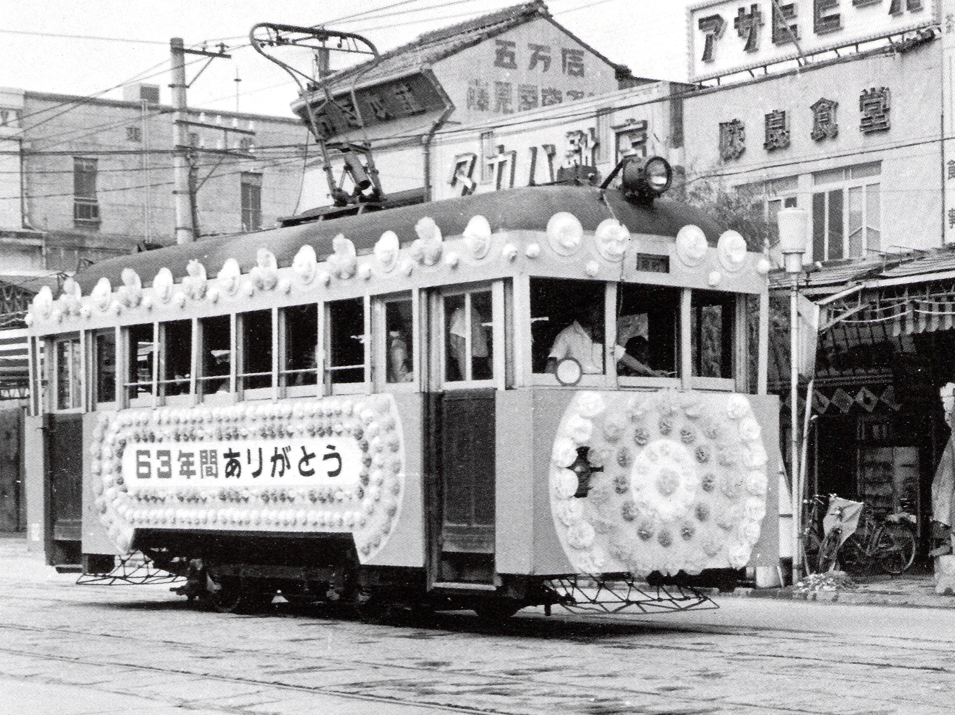 1962年6月17日に廃止された岡崎市内線の路面電車。これはさよなら運転に向け装飾された2両の花電車のうちスピーカーを搭載していないモ50形62号（市川満「姿を消した岡崎の名鉄線」鉄道ピクトリアル、1979年より）